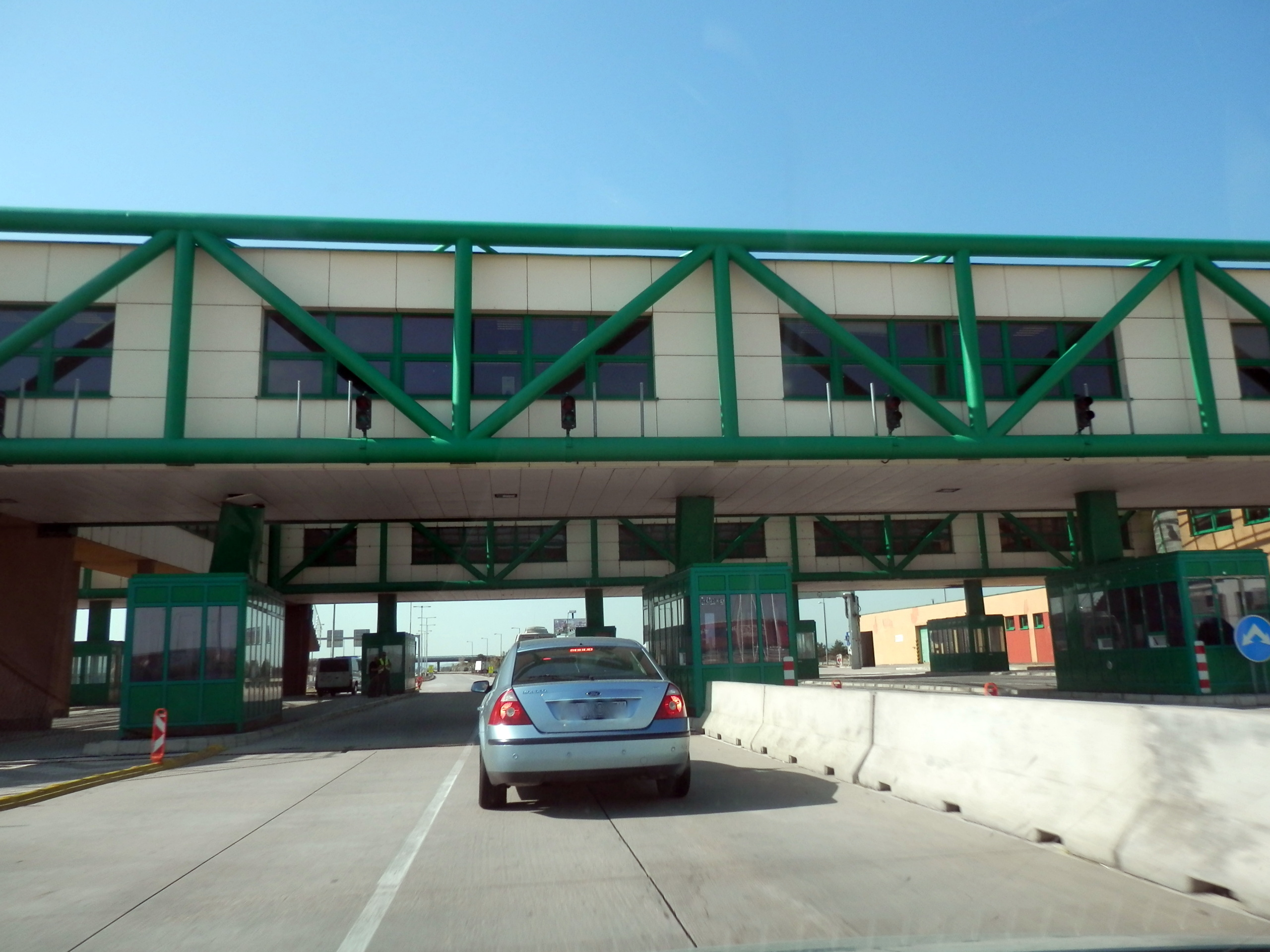 Rajka - hraničný priechod medzi Maďarskom a Slovenskom. Leto 2013.